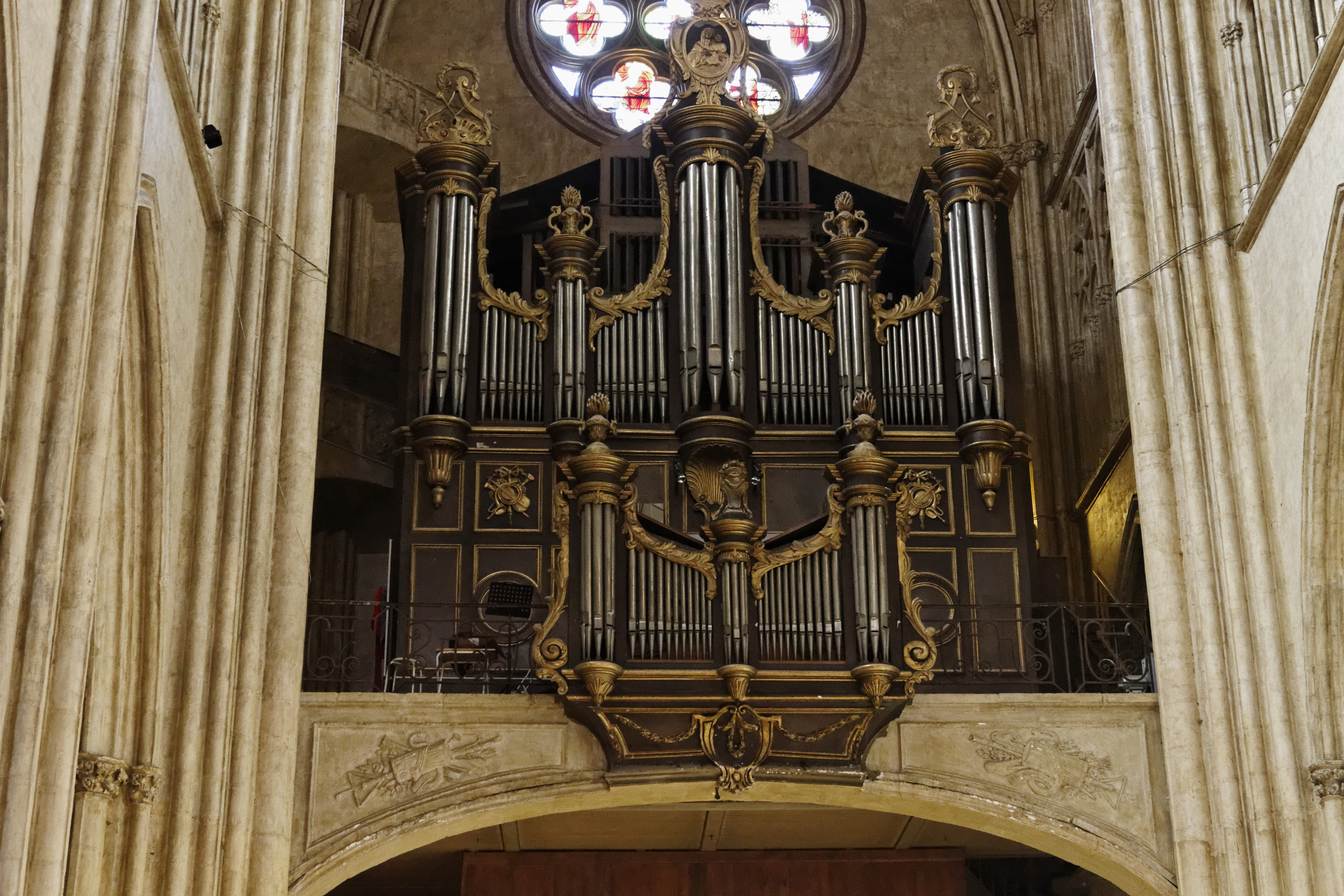 Orgue de la Cathédrale Notre-Dame de Bayonne